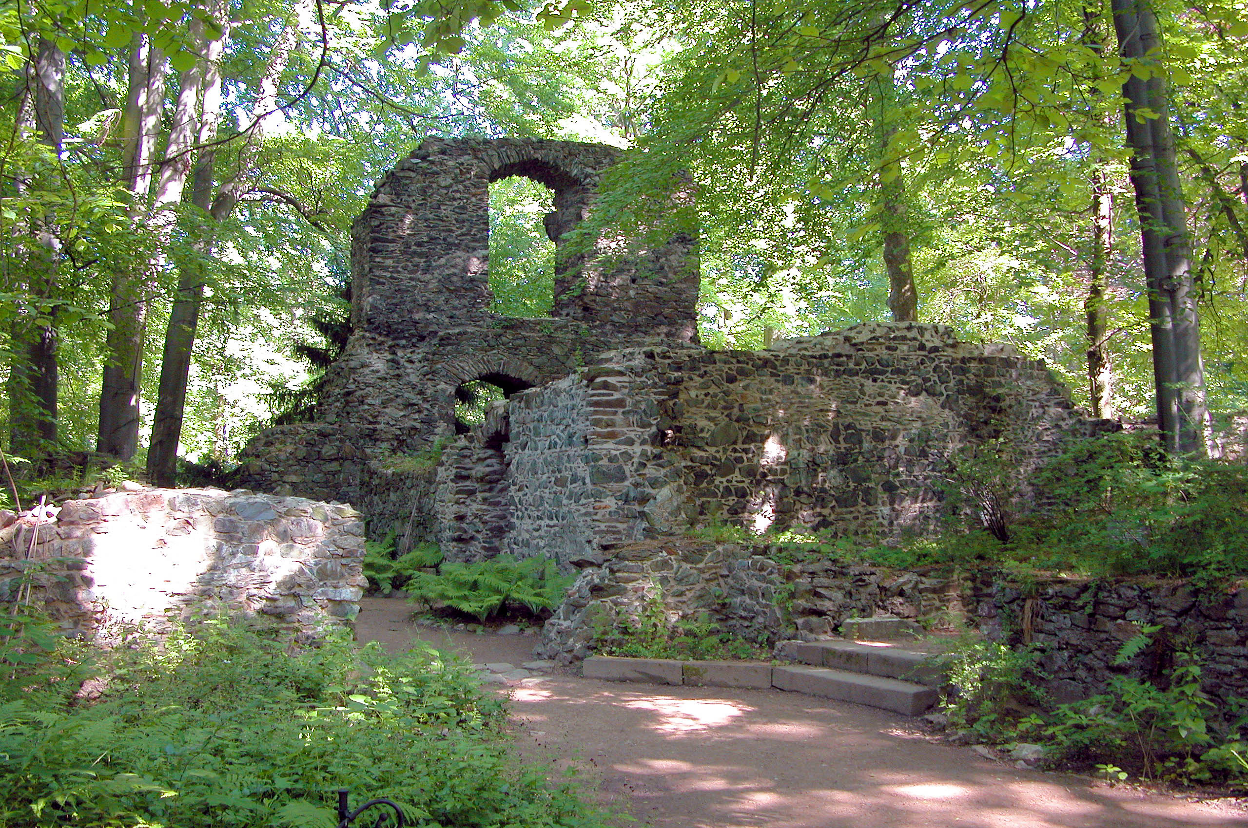 30.05.2003 01683 Altzella (Nossen): Kloster Altzella. Ruine der Abtei (GMP: 51.061010,13.277725). [DSCNx.JPG]20030530500JPG(c)Blobelt